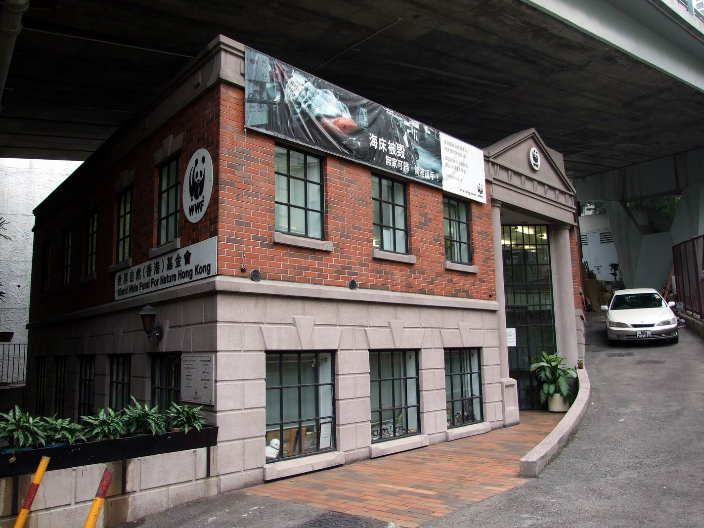 世界自然基金會香港分會中環辦事處